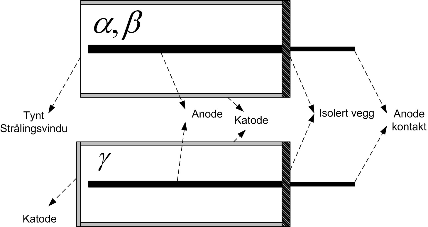 GM-rør med tynt strålingsvindu for deteksjon av alfa og beta partikler og med tykke katodevegger for deteksjon av gammastråler